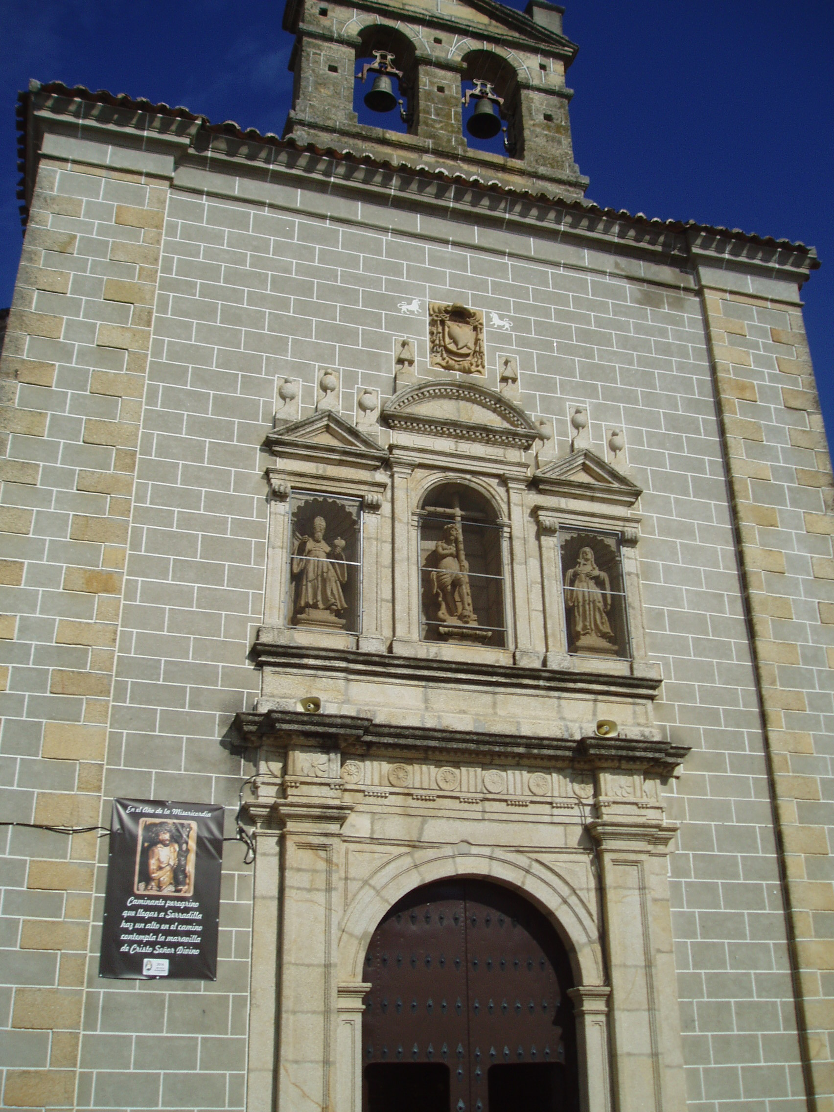 Fachada del convento de las madres Agustinas Recoletas de Serradilla.